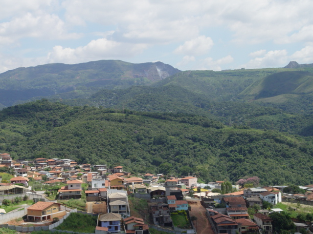 Nova Lima (MG), Brazil - Vista parcial / partial view